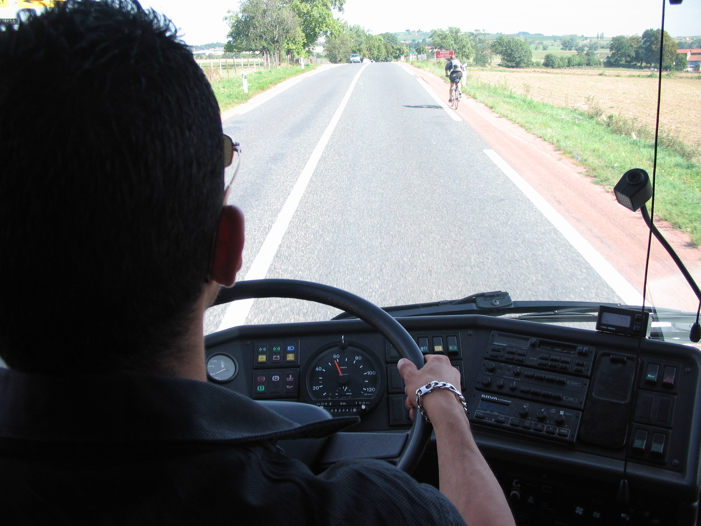 Trajet en autocar, vue poste de conduite Bova Futura.